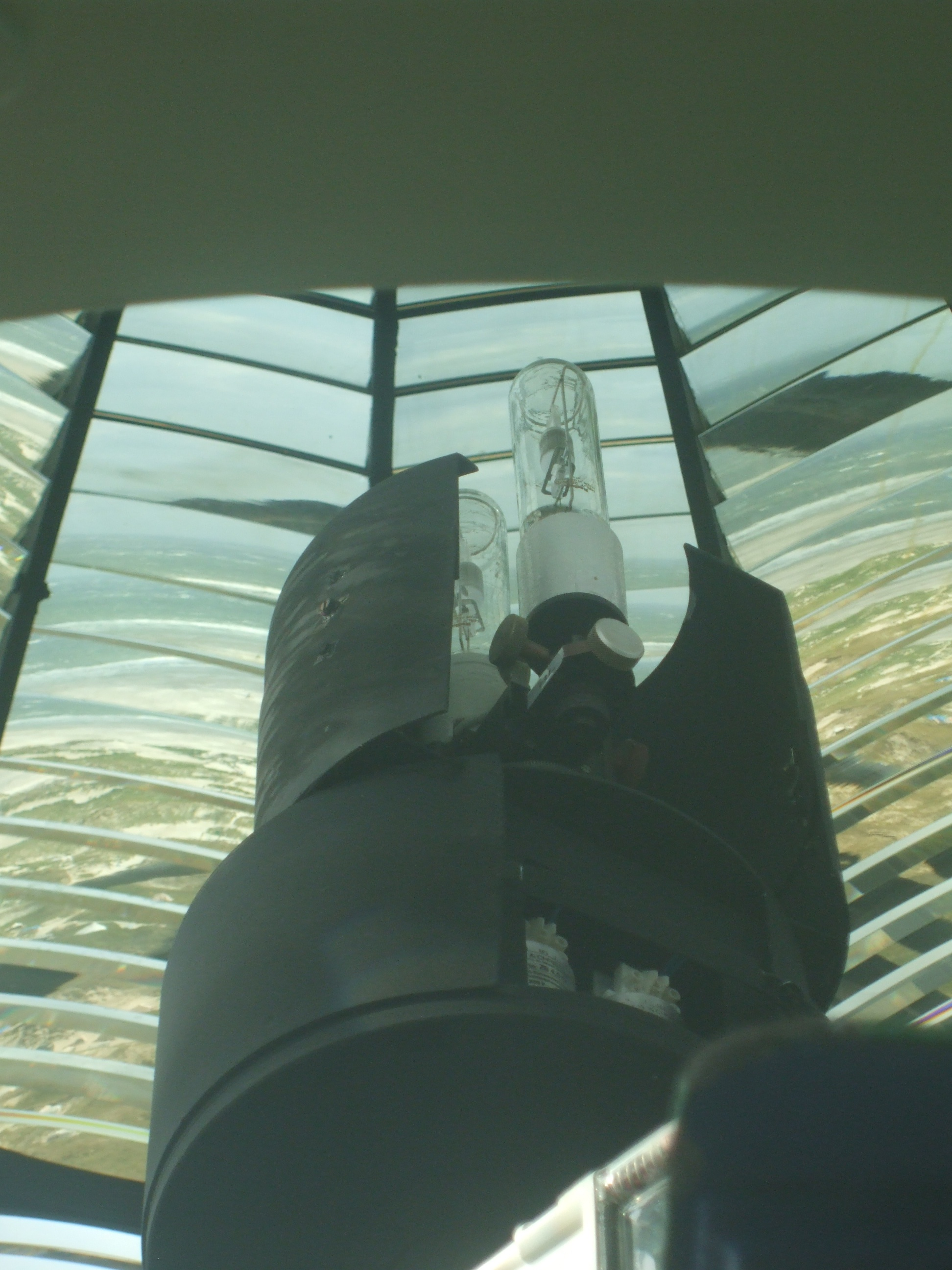 Leuchtturm auf Amrum - Innenansicht